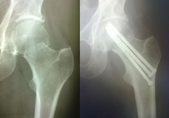 Остеосинтез гвинтами при переломі шийки стегна, одразу після травми та через 5 місяців після операції